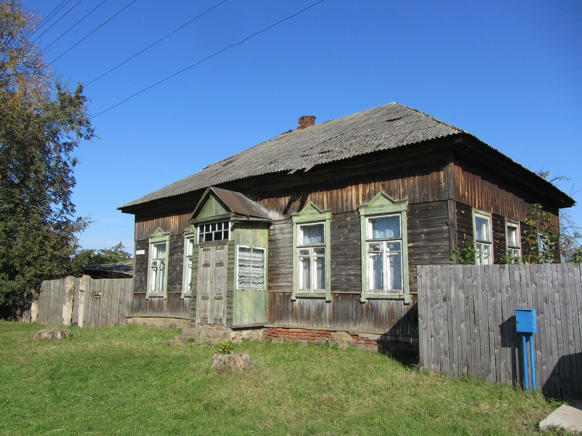 Рагачоў. Дом Уладзіміра Караткевіча